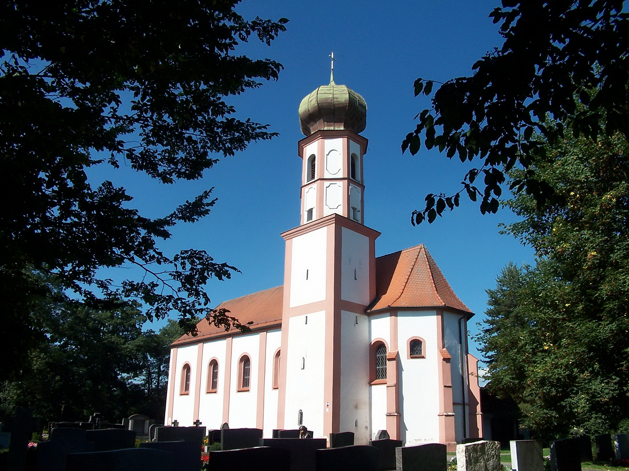 Schönach. St.-Martin-Straße 10; Äußere Au. Ehemalige katholische Pfarrkirche St. Martin, jetzt Friedhofskirche. Saalbau mit eingezogenem Chor, Flankenturm mit Zwiebelhaube und Pilastergliederung, Chor und Turmuntergeschosse gotisch, Langhaus barock, 1894 erweitert; mit Ausstattung; Reste der Friedhofsmauer, 18. Jh. Das Bild wurde 2006 aufgenommen. 2015 wurde die Kirche innen und außen umfassend renoviert.